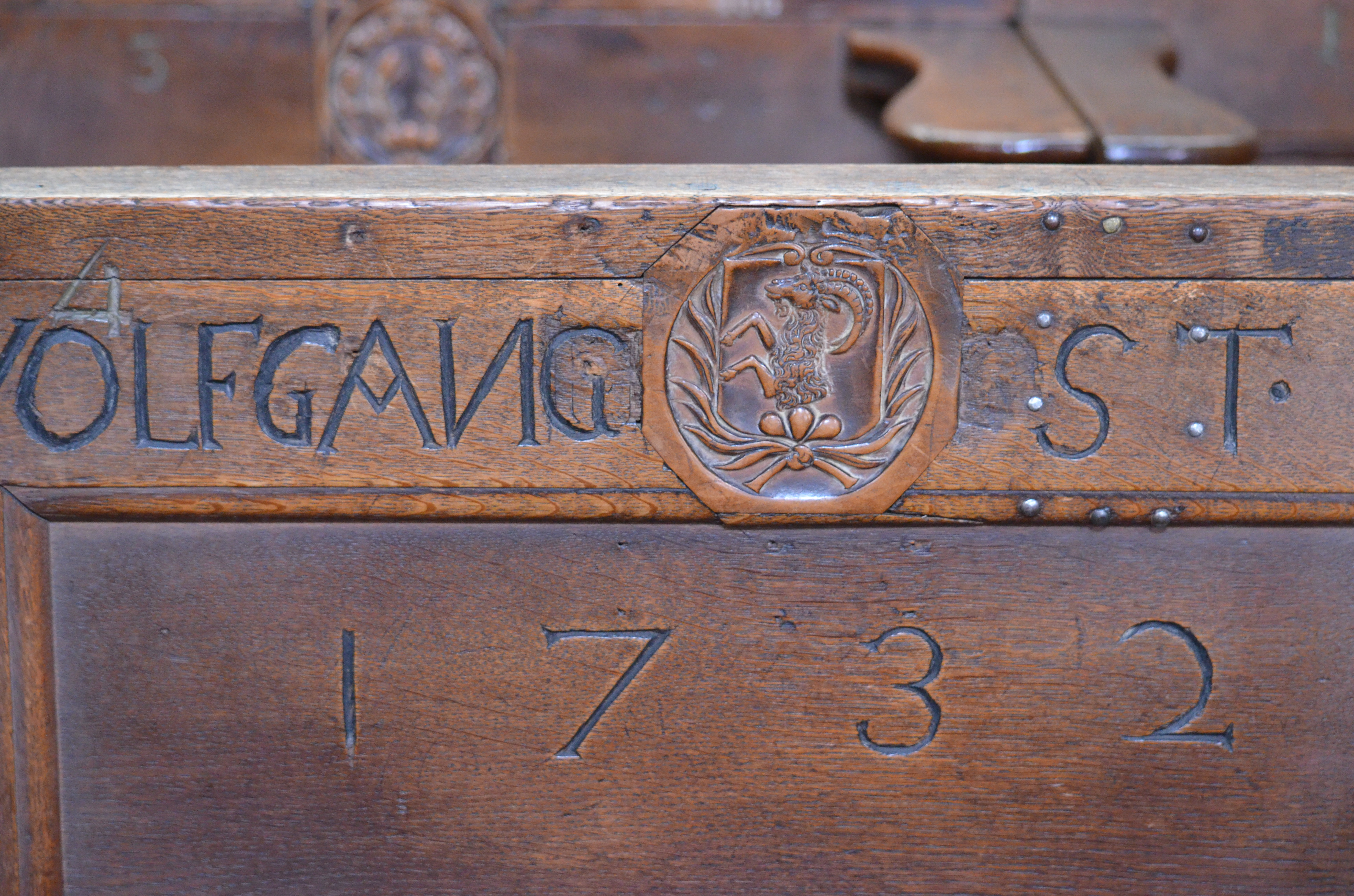 Bern, Münster, Kirchenortschild Steiger (weiss)